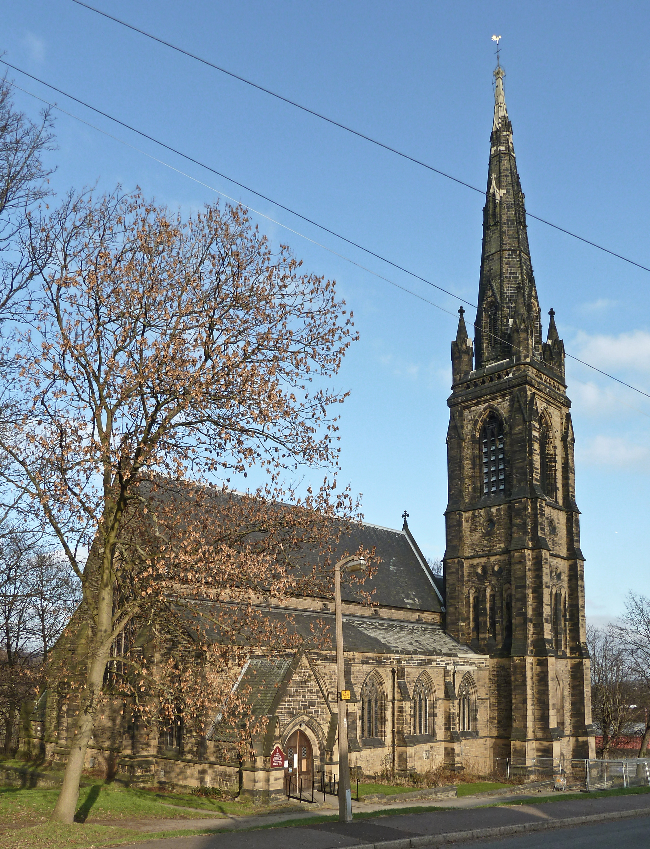 St John the Evangelist, Birkby